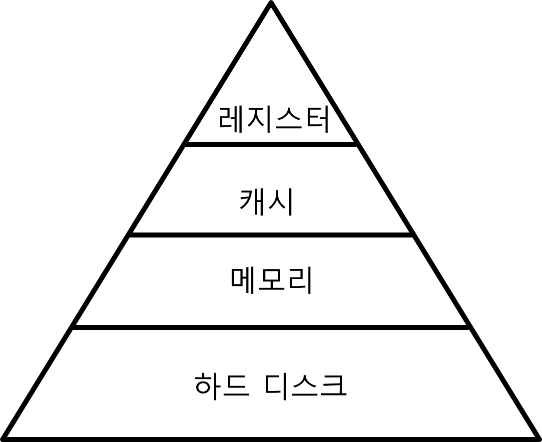 "메모리 계층 구조" 설명 그림1